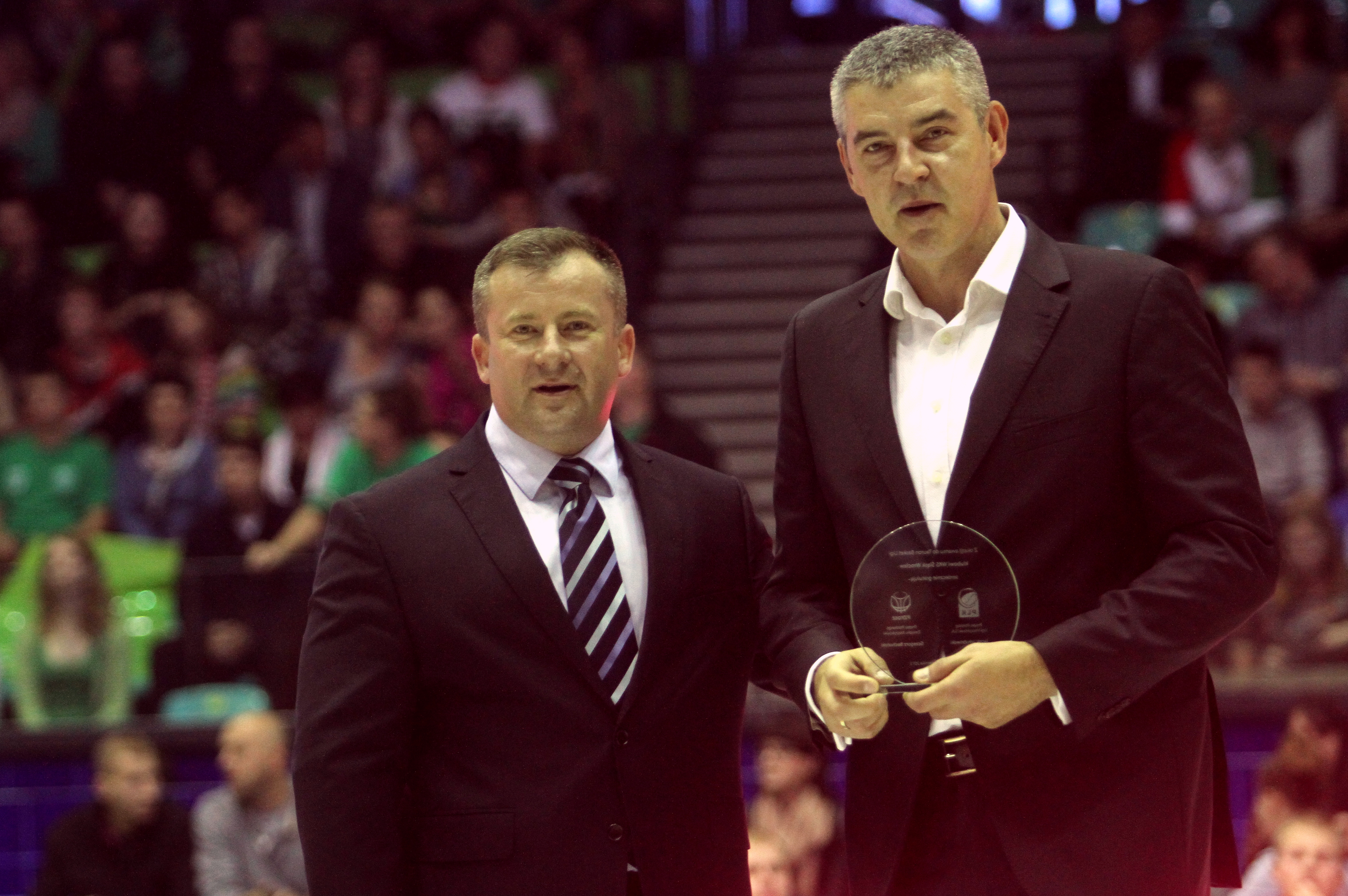 Jacek Jakubowski, Prezes Polskiej Ligi Koszykówki, Maciej Zieliński, Śląsk Wrocław